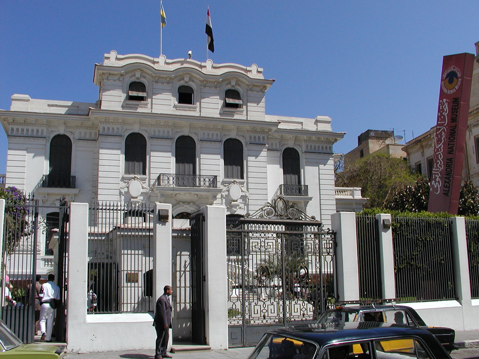 Musée national, Alexandrie, Égypte).